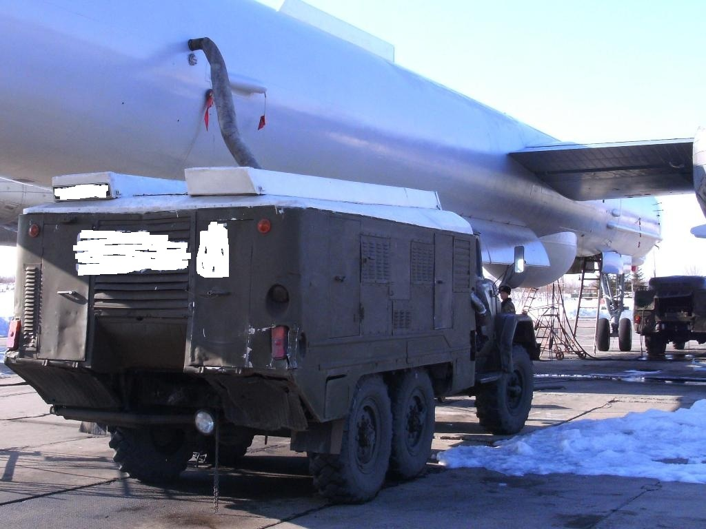 АМК-24 подаёт воздух в СКВ технического отсека самолёта